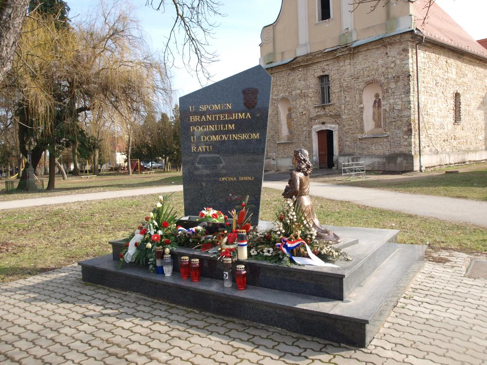 Spomenik poginulim braniteljima u Sibinju, Brodsko-posavska županija.